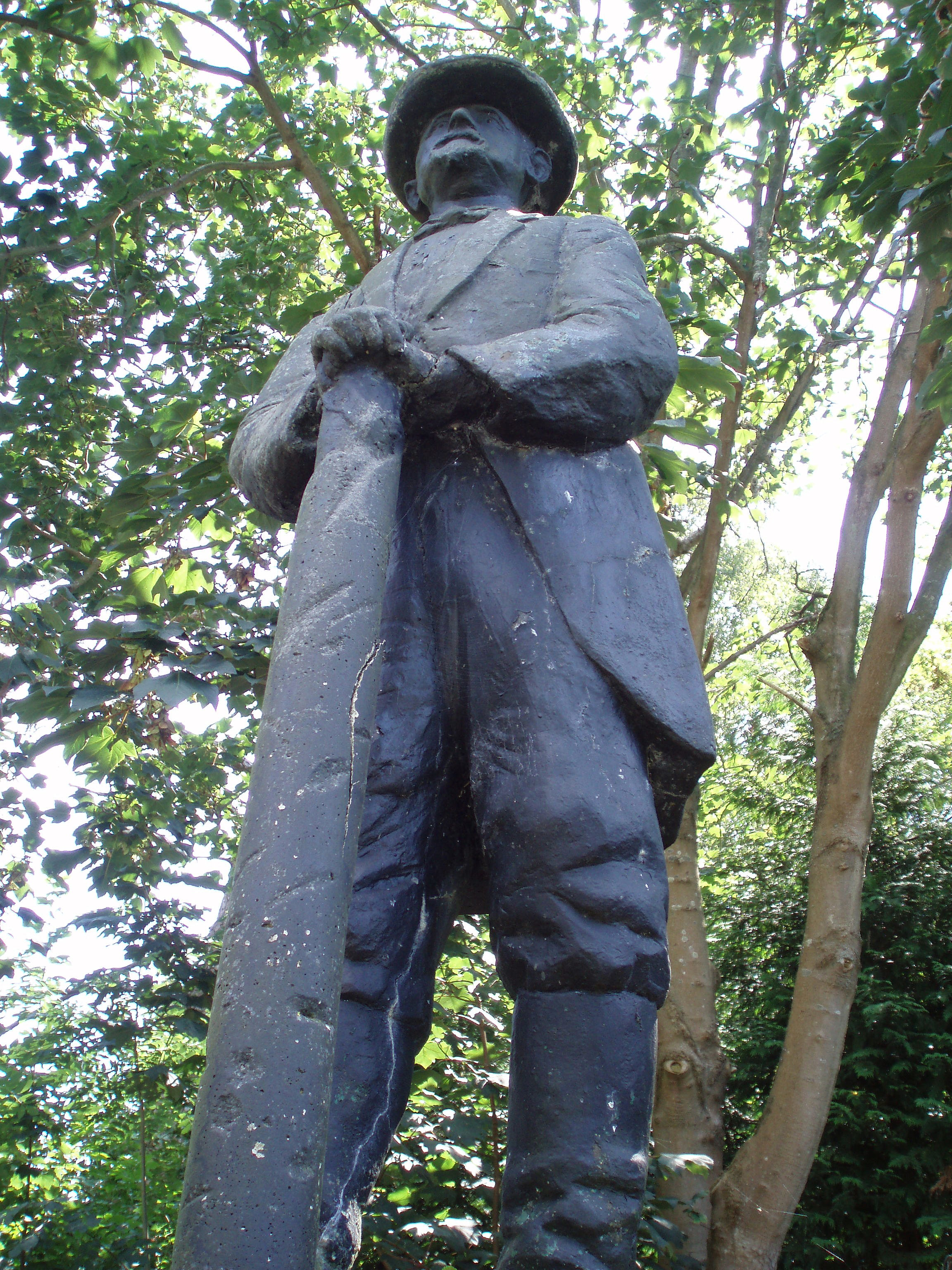 Standbeeld van Hein Aalderink bij het Paviljoen Sassenhein in de gemeente Haren.